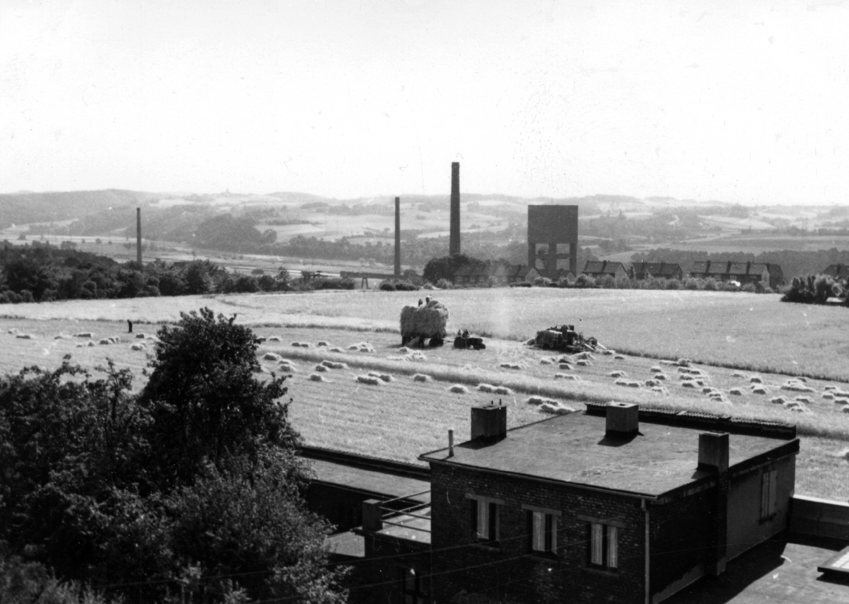 Zeche Vereinigte Dahlhauser Tiefbau in Bochum, Germany. The valley of the river Ruhr can be seen in the background.